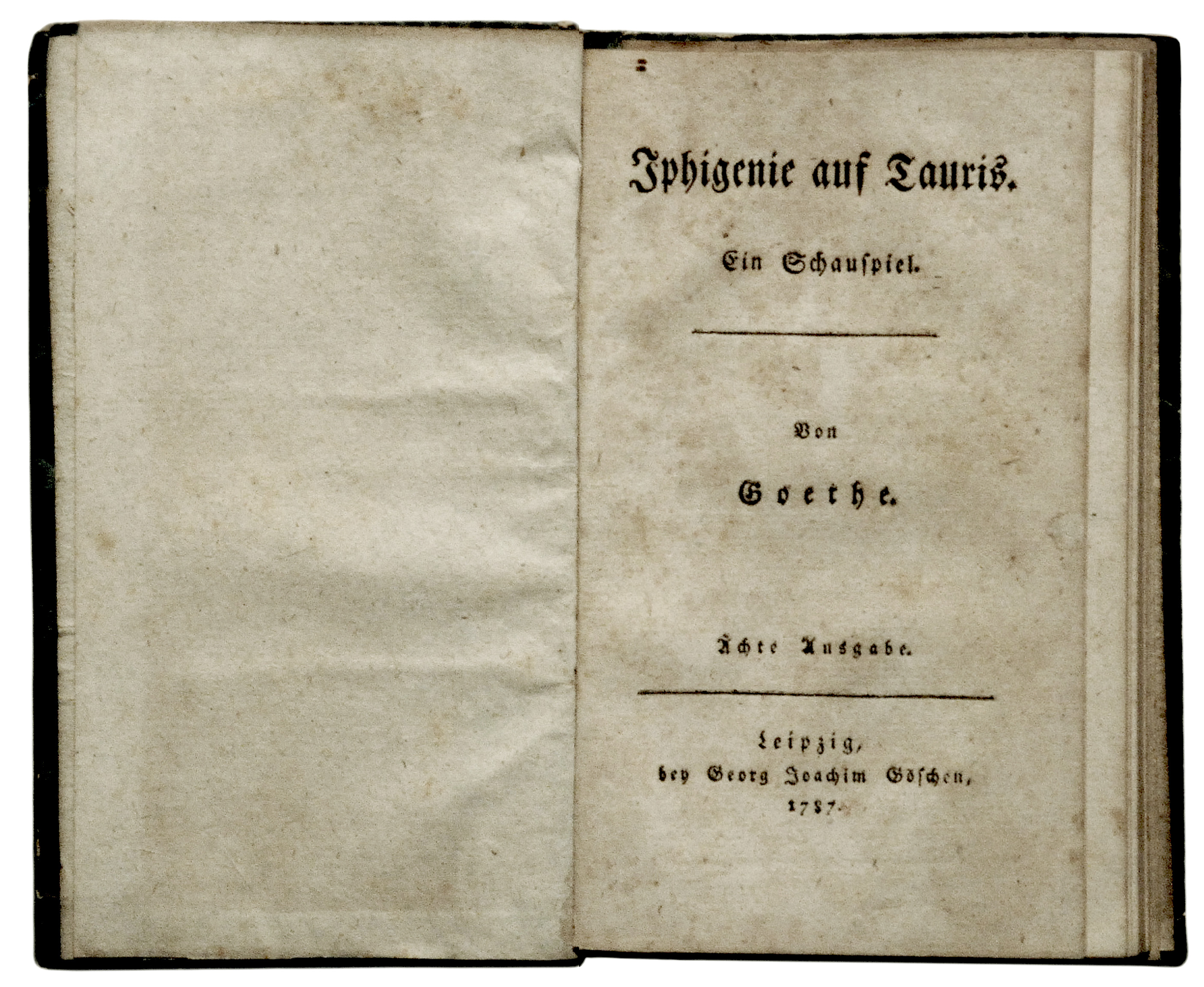 Iphigenie auf Tauris. Titelblatt des Erstdruckes. Johann Wolfgang von Goethe (1749–1832) Description German poet Date of birth/death28 August 174922 March 1832Location of birth/deathFrankfurt, GermanyWeimar, GermanyAuthority control VIAF: 24602065 ISNI: 0000 0001 2099 9104 ULAN: 500014761 LCCN: n79003362 NLA: 35129828 WorldCat